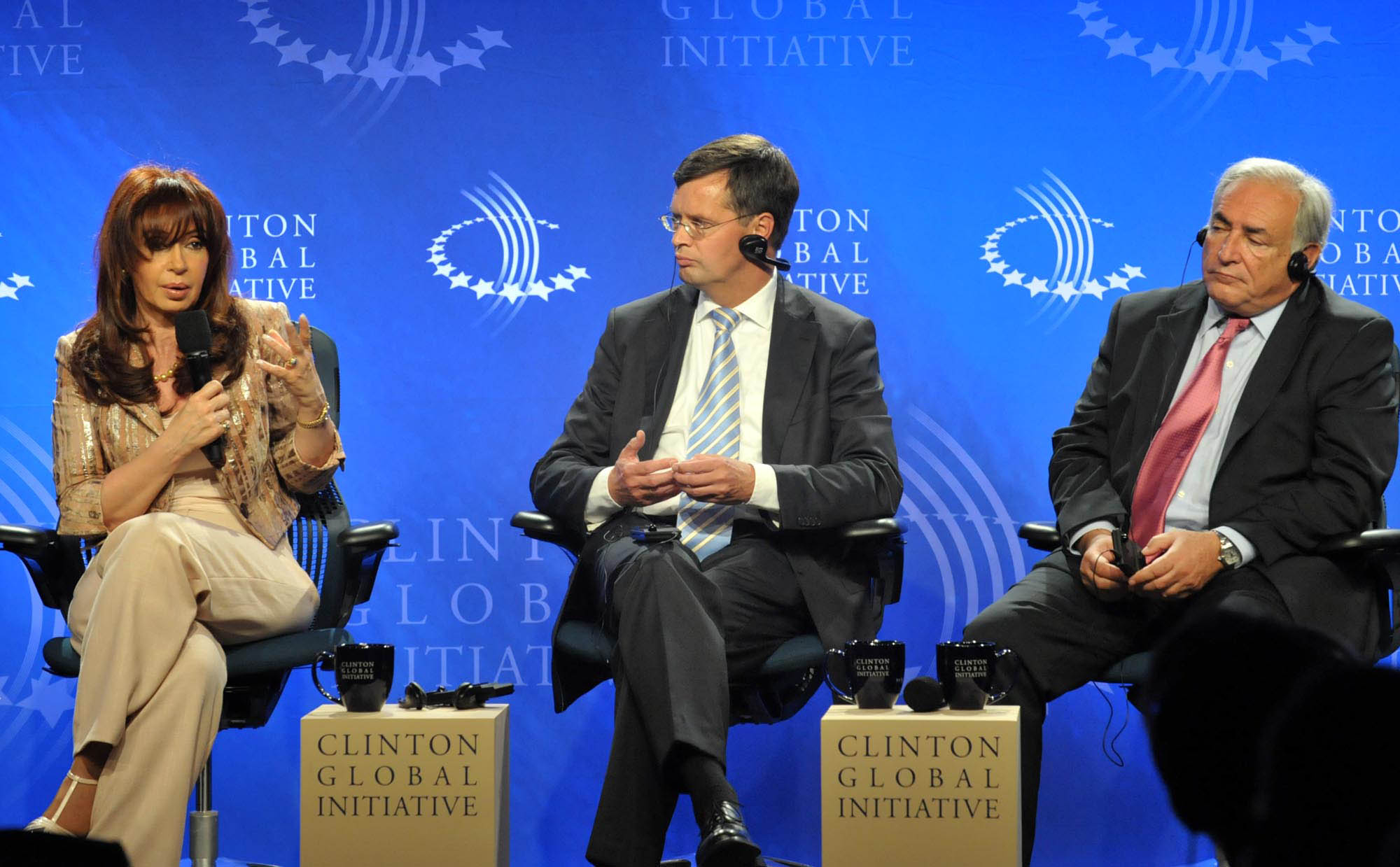 Cristina Fernández, junto al titular del Fondo Monetario Internacional, Dominique Strauss Kahn, en la V Asamblea de la Clinton Global Initiative